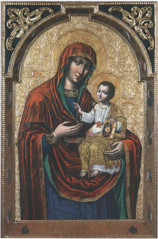 Iow (Job) Kondzelewicz (1667-1740), hieromonach, malarz ikon